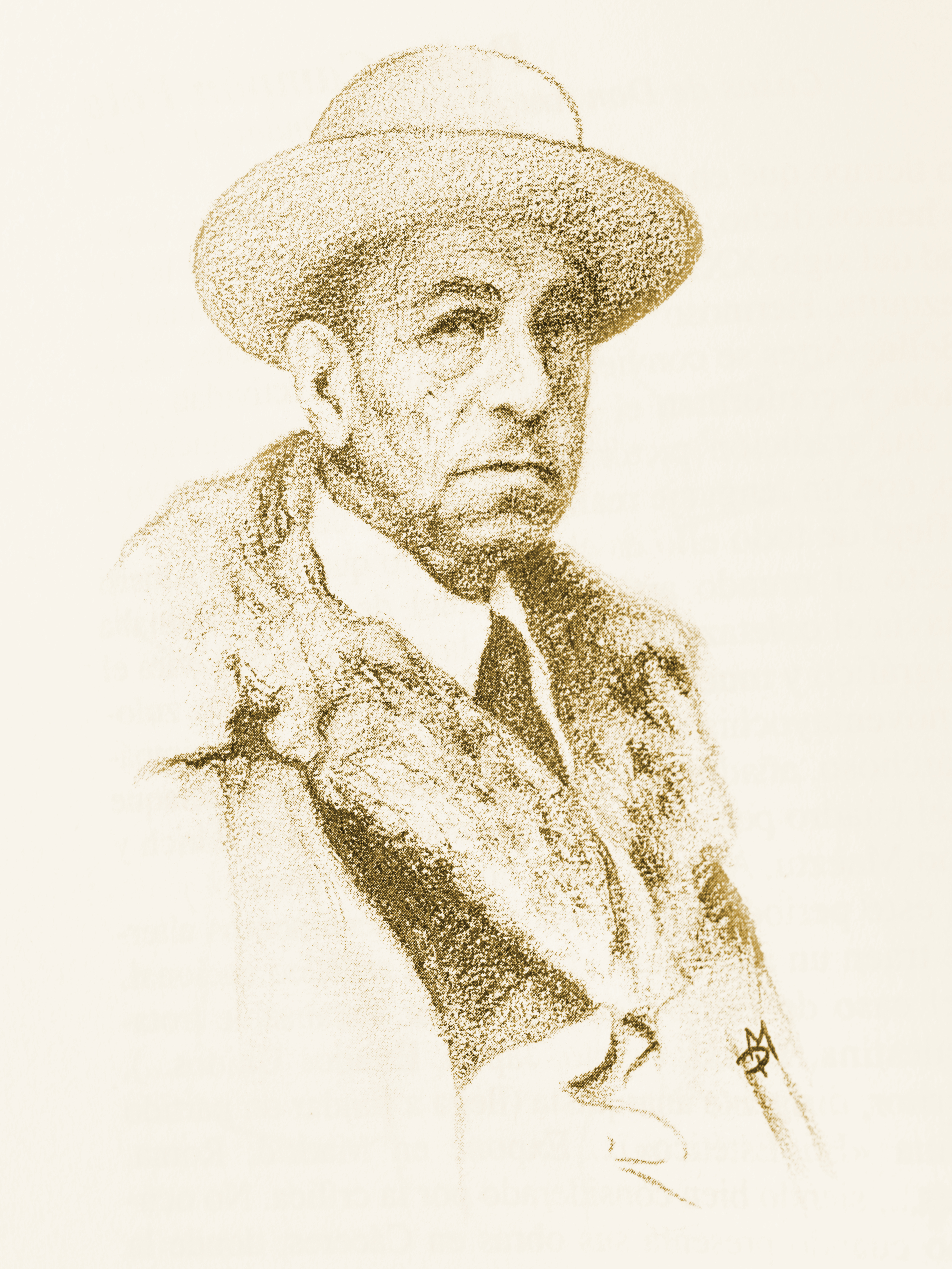 Miguel Pérez Reviriego. Retrato de Rafael Gómez Catón, 1995. Lápiz sobre papel. Publicado en Pérez Reviriego, Miguel (1996). Cien artistas de Extremadura. Badajoz: Carisma Libros. p. 114. ISBN 8488964110. Reproducido en Moral Martínez, Diego del (2009). "Biografía". Guillermo Silveira – Exposición 26 de marzo-31 de mayo de 2009 – Museo Provincial de Bellas Artes (Badajoz: Diputación Provincial). p. 25. ISBN 978-8493596088.